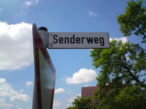 Senderweg zum Sender Ulm-Jungingen.